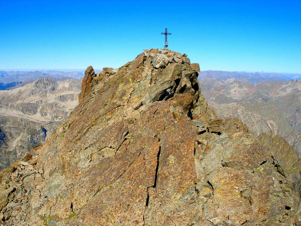 Vetta della Cima di Nasta con la croce di vetta - Alpi Marittime